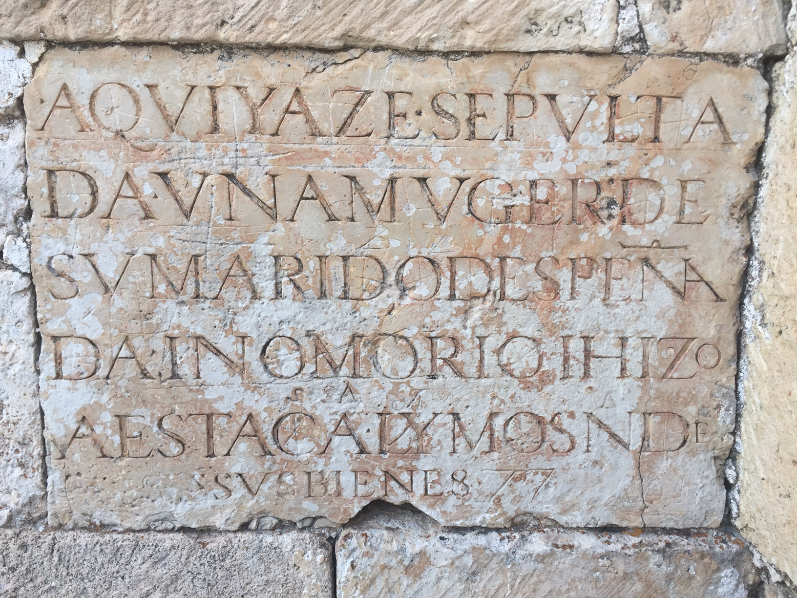 Imagen de la inscripción conmemorativa de la mujer despeñada